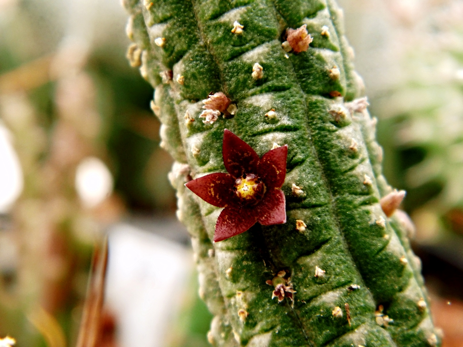 Africa succulent plant, Huernia, Orbea, Duvalia, Stapelia etc.